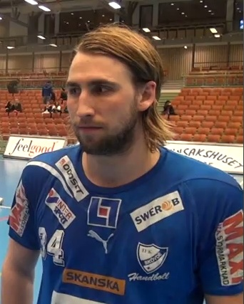 Tobias Warvne i IFK Skövde